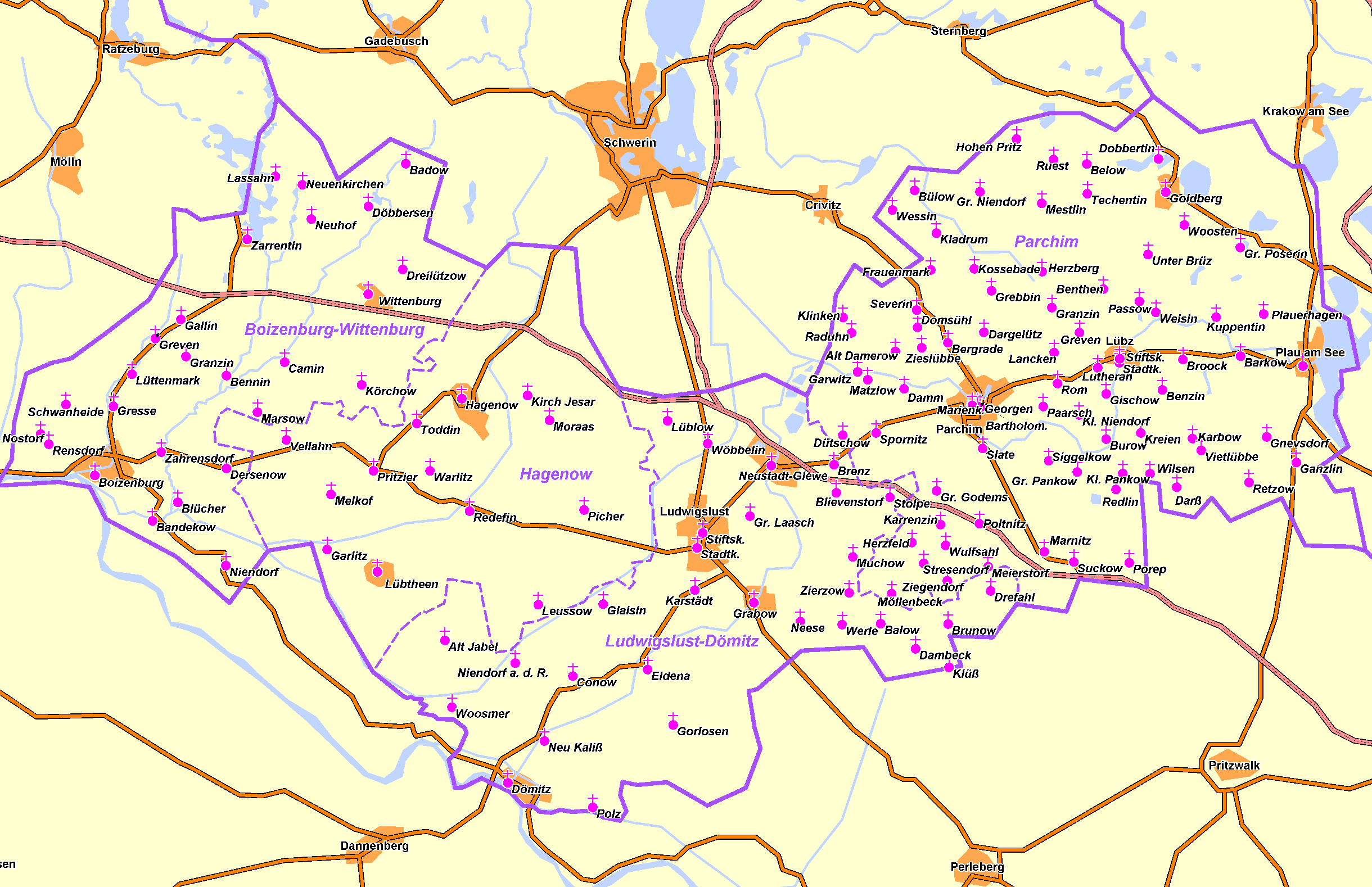 Karte der Propstei Parchim im Kirchenkreis Mecklenburg der Nordkirche